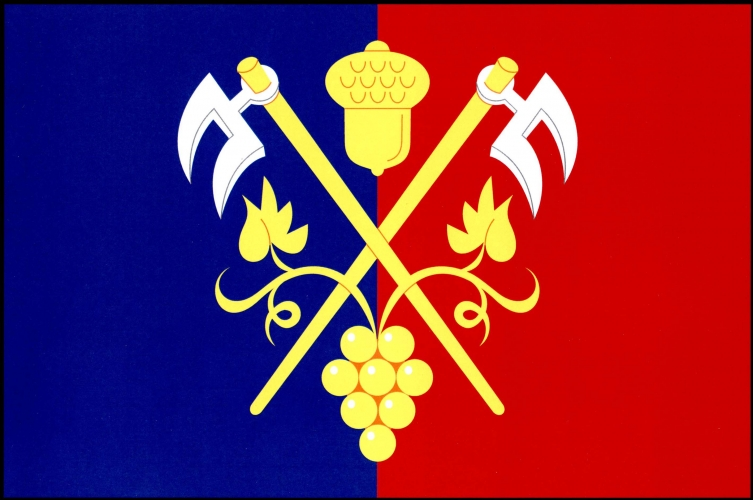 vlajka, Dobelice, okres Znojmo